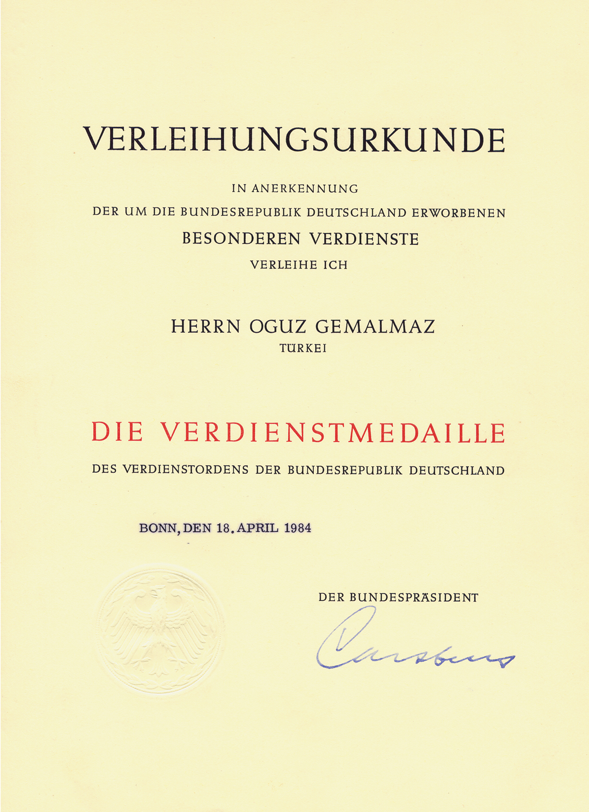 Alman Cumhurbaşkanı'nın 18.04.1984 tarihinde bana verdiği madalyanın beratı. Oğuz Gemalmaz